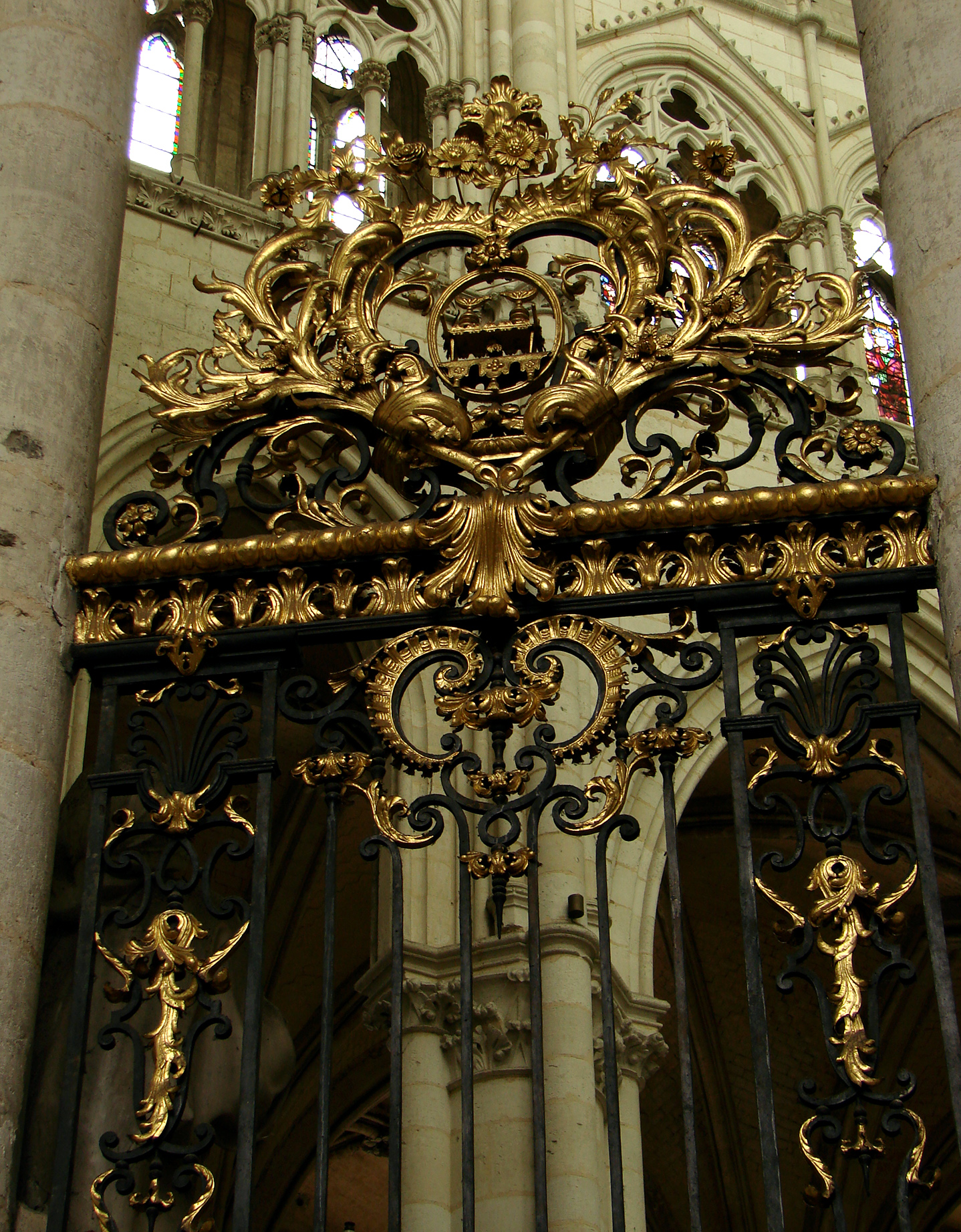 Grilles du choeur de la cathédrale d'Amiens par Jean Veyren, 18ème siècle.